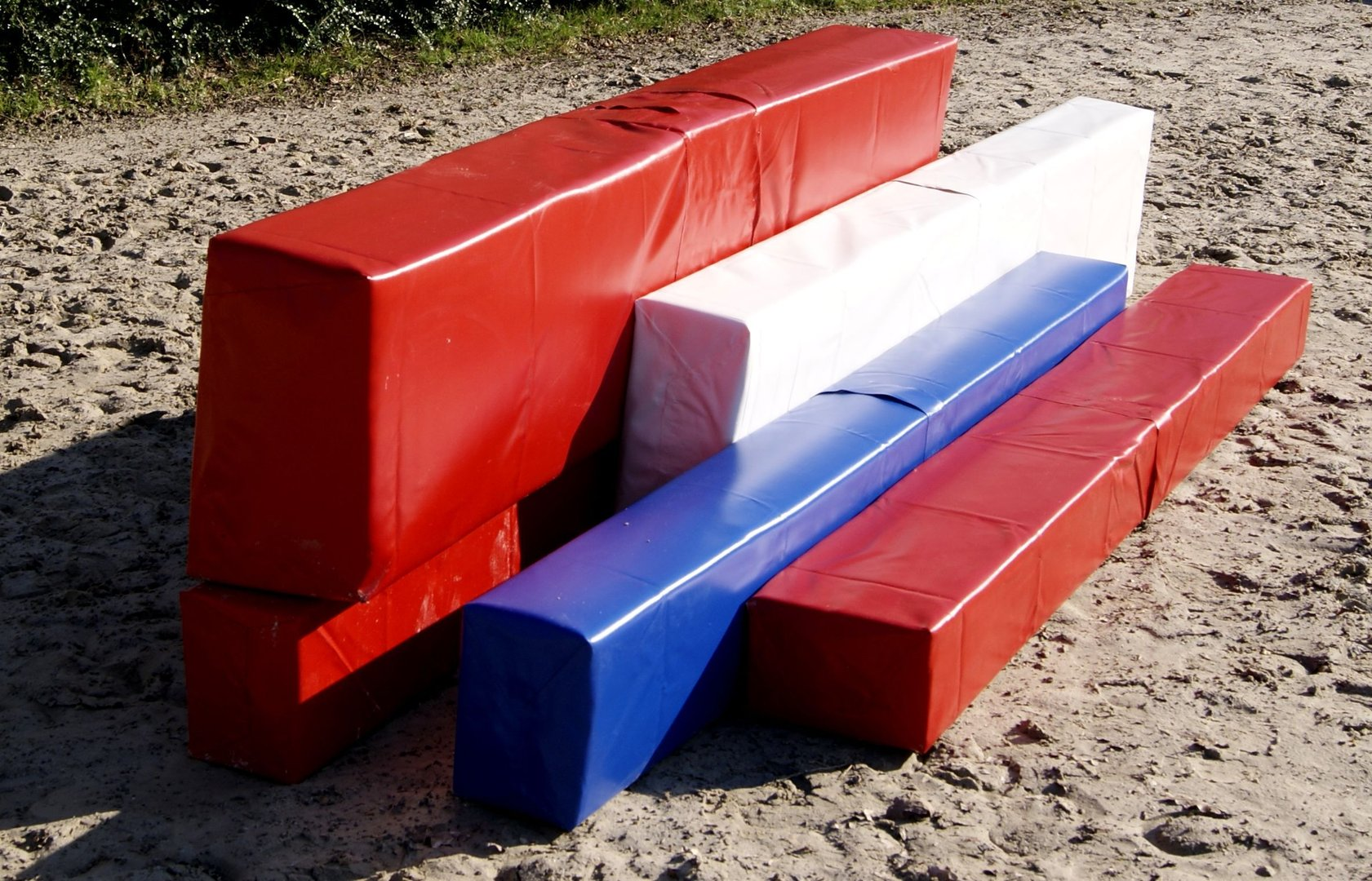 Cavaletti Systembalken aus verletzungsfreiem Kunststoff